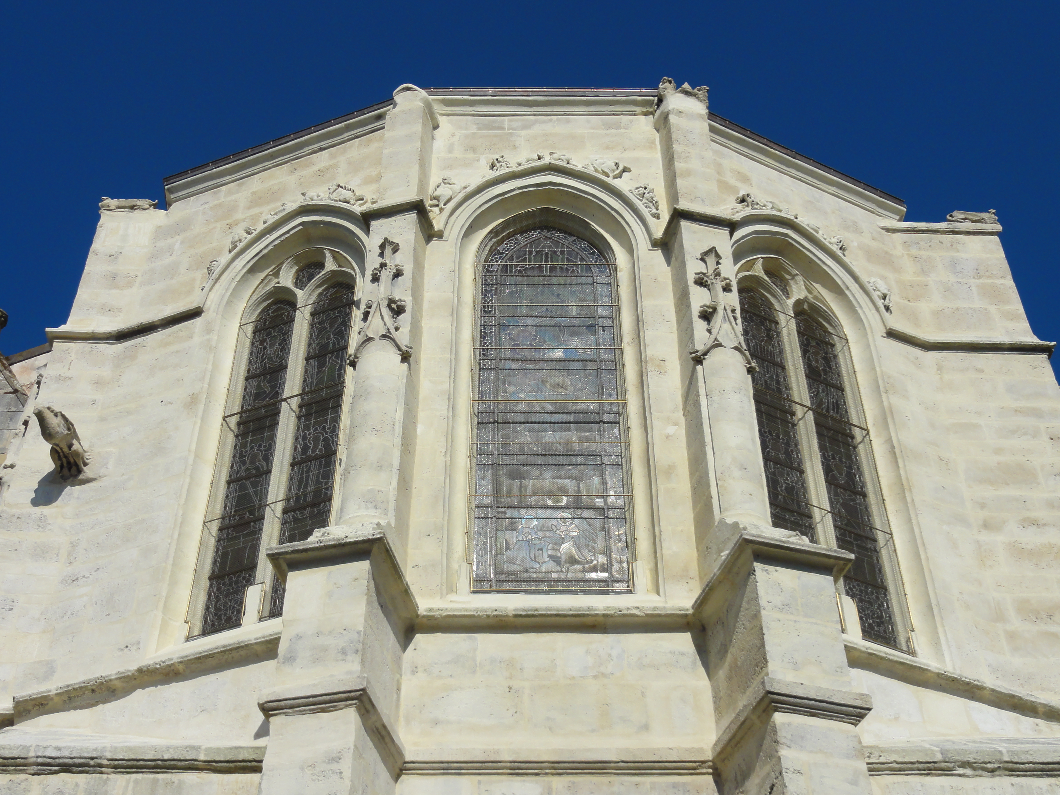 Chevet, parties hautes.